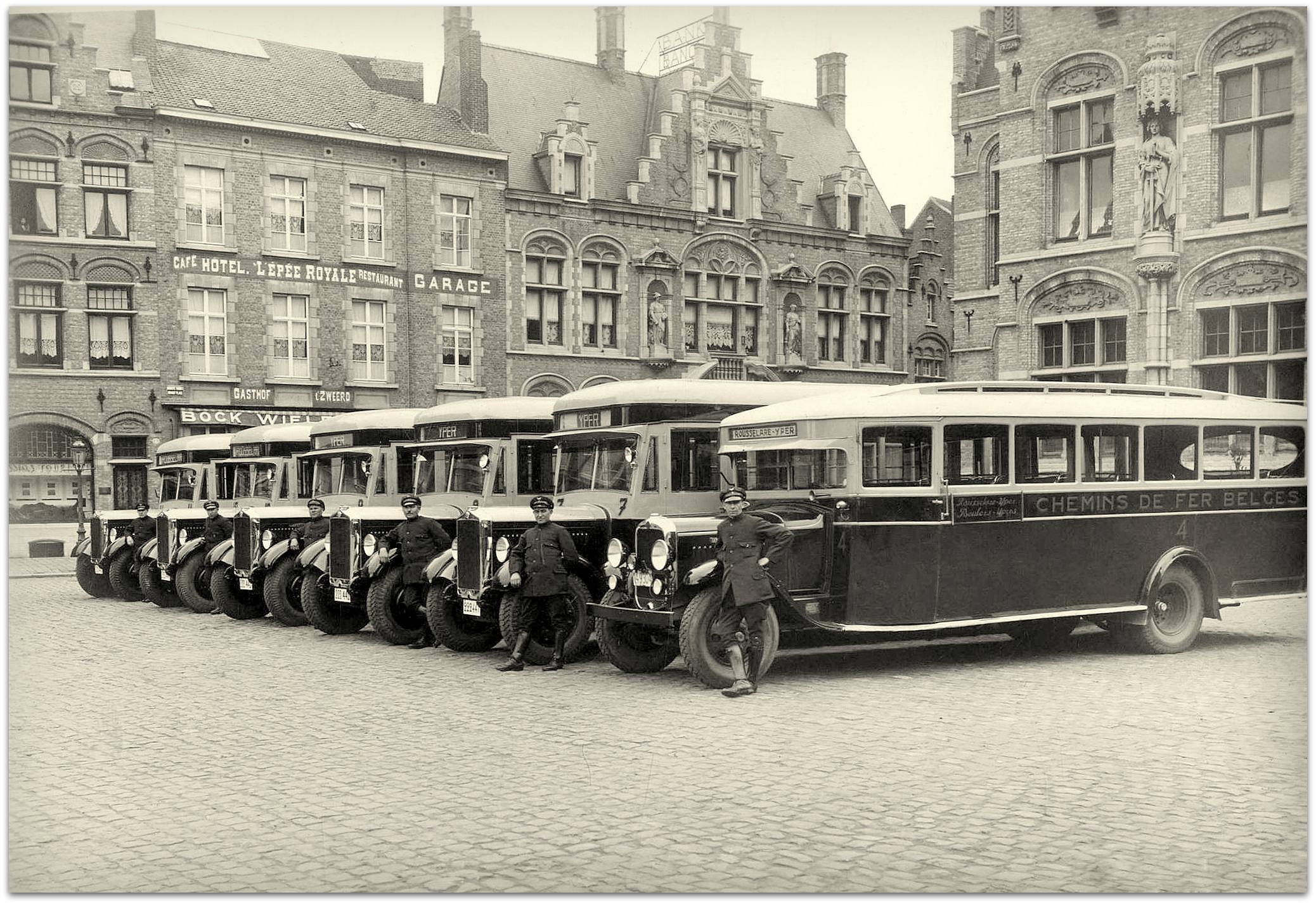 L'autocariste Deceuninck & Verstraete présente à Ypres sa flotte d'autobus qui va servir au remplacement des trains sur la ligne 64 Ypres - Roeselare.